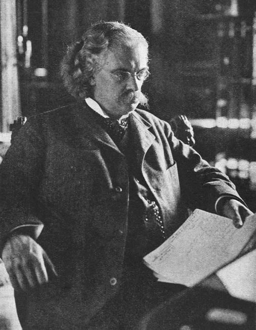 PROFESSOR GÖSTA MITTAG-LEFFLER I SITT ARBETSRUM.